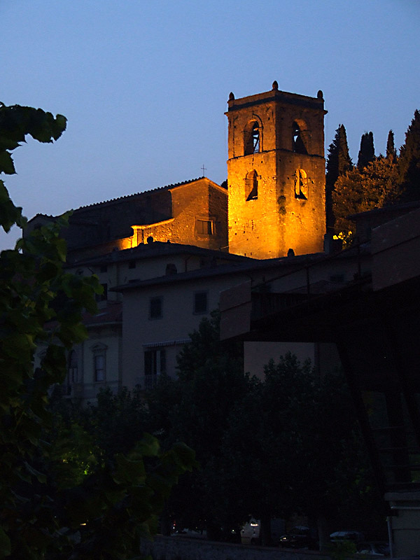 Montecatini Terme, Toscana, ItaliaDSCF2397s